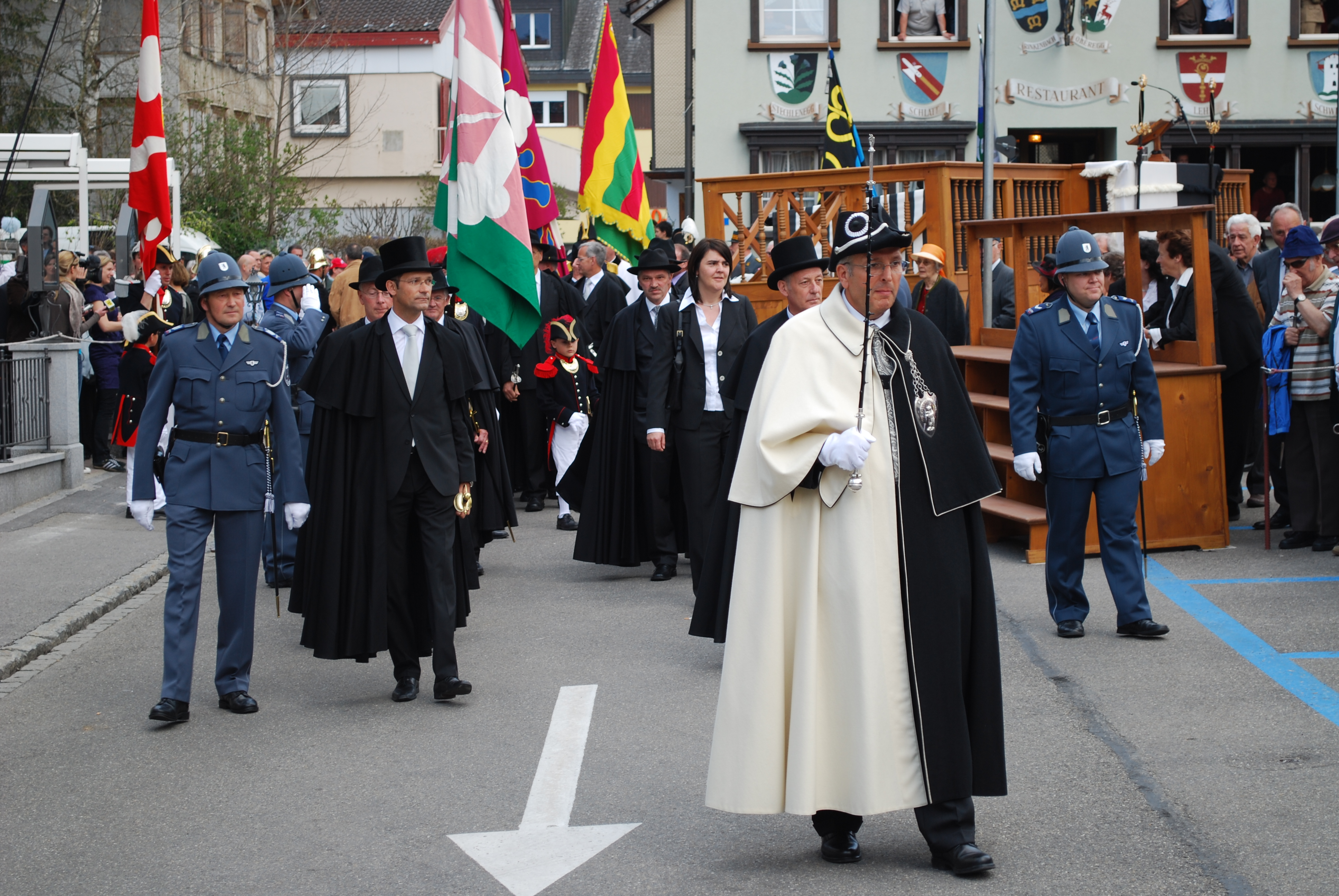 Die Regierung des Kantons Appenzell Innerrhoden nach der Landsgemeinde 2010. Vorne links Daniel Fässler; Rechts hinter dem Weibel Carlo Schmid-Sutter; Hinter ihm, ohne Hut, die gerade neugewählte Antonia Fässler